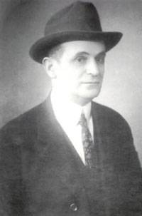 Foto de José López Prudencio